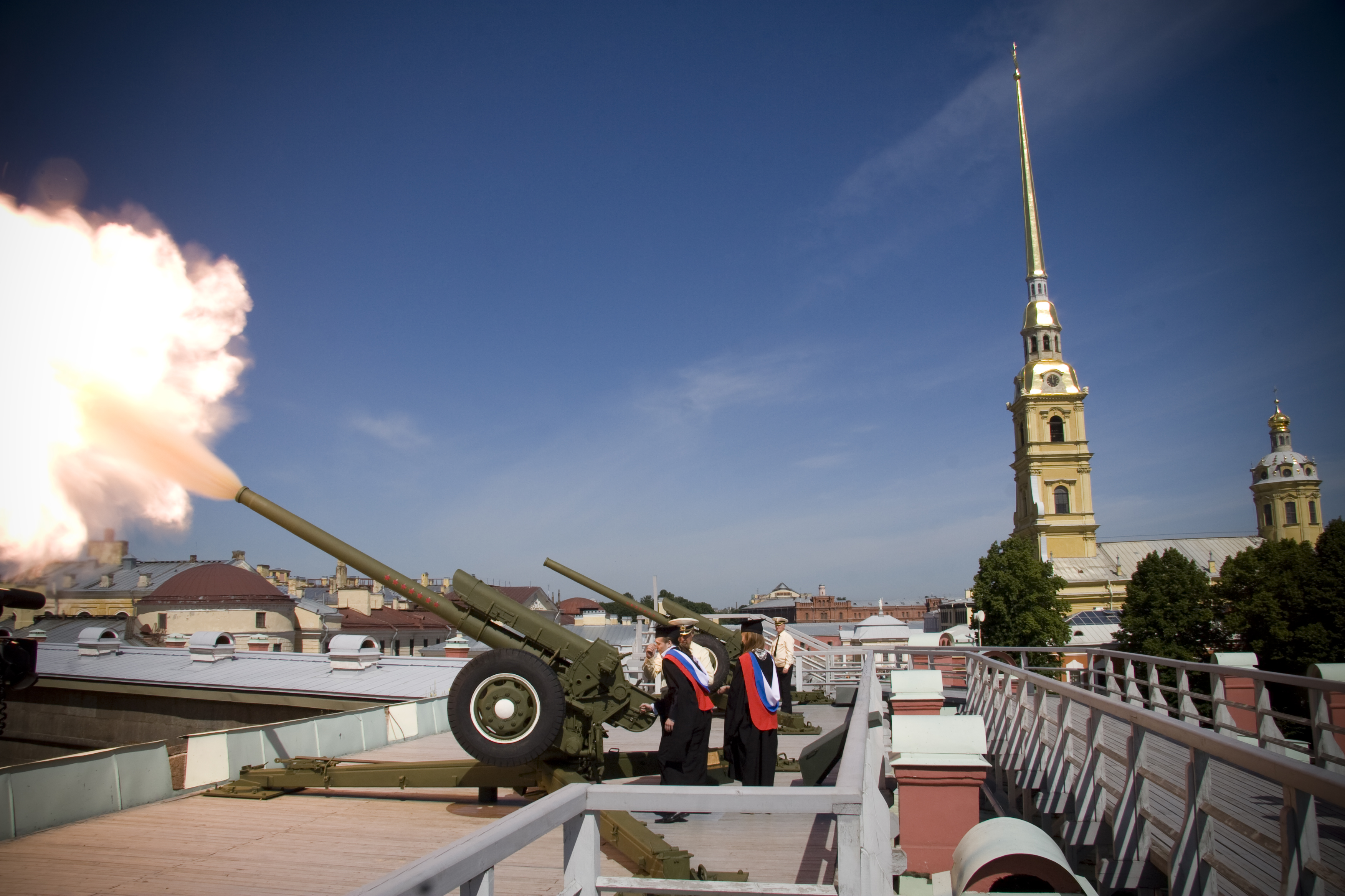 Выстрел из пушки бастиона Петропавловской крепости в честь выпускников СПбГУ ИТМО